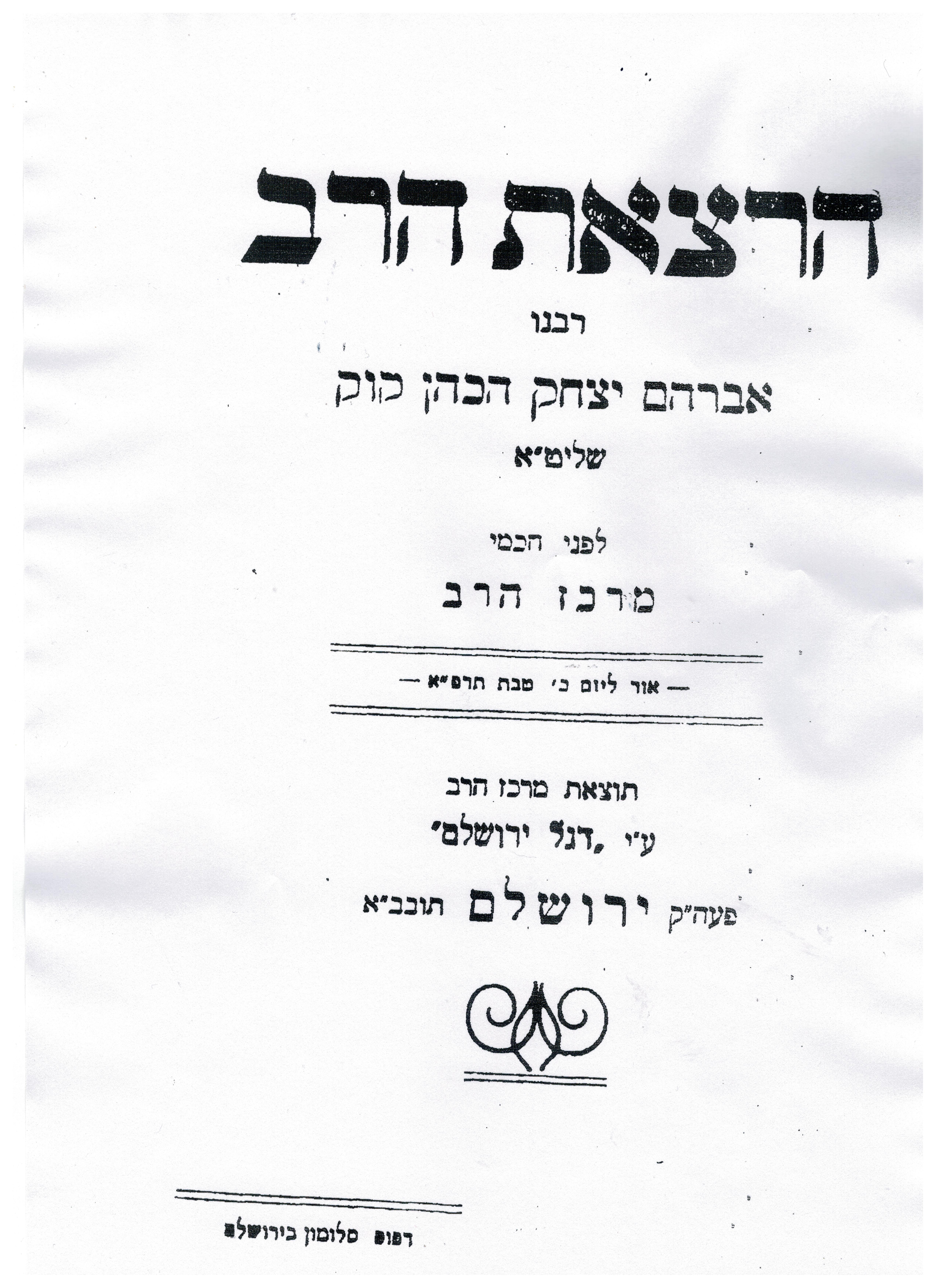 שער החוברת במהדורתה הראשונה